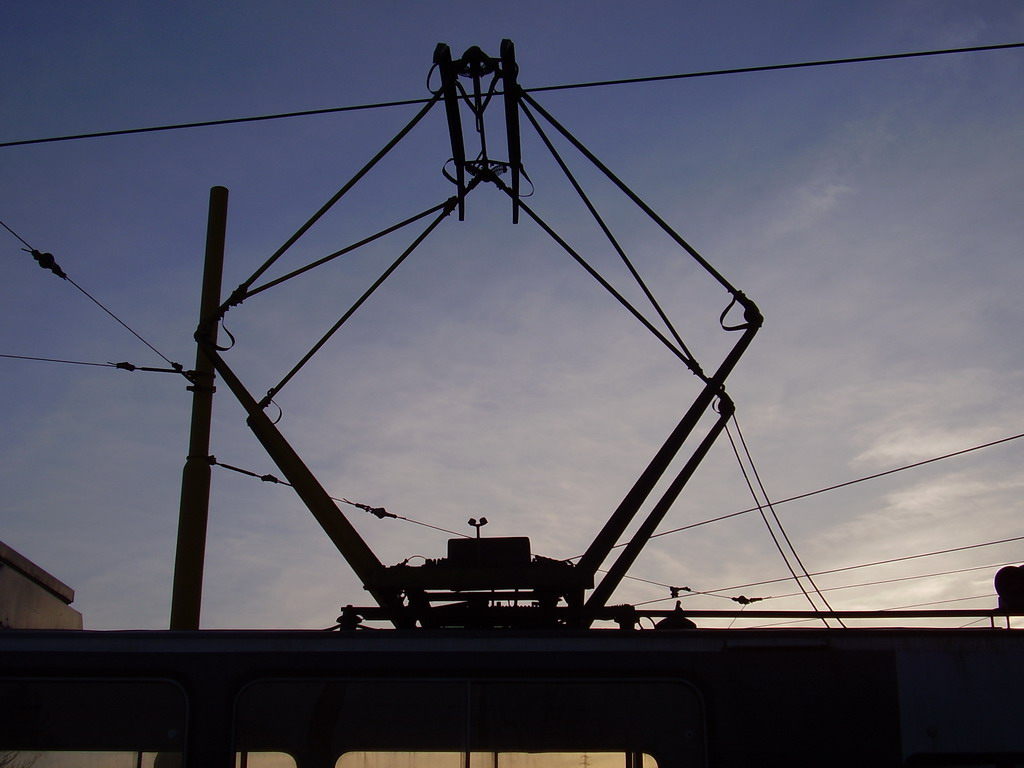 Pantograf z električky.